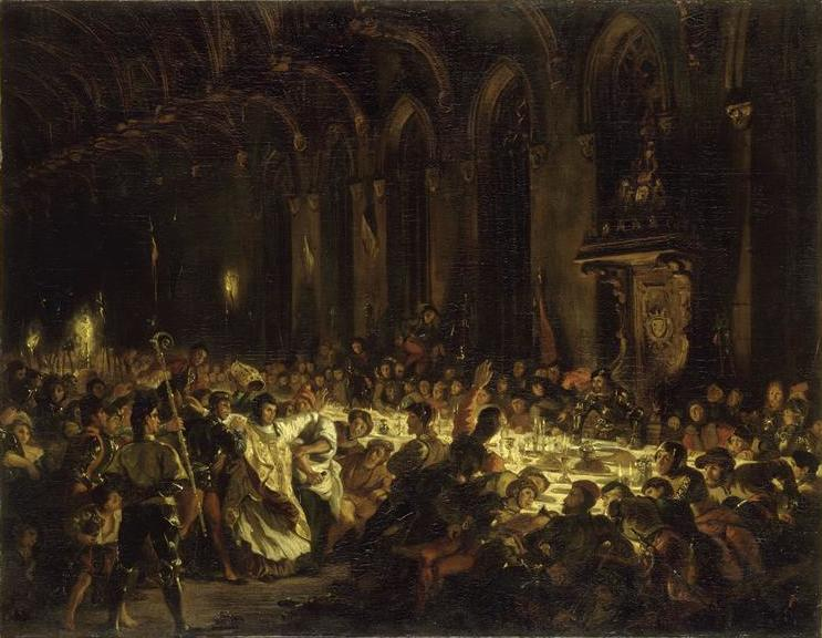 L'Assassinat de l'évêque de Liège dit aussi Guillaume de la Marck, surnommé le Sanglier des Ardennes